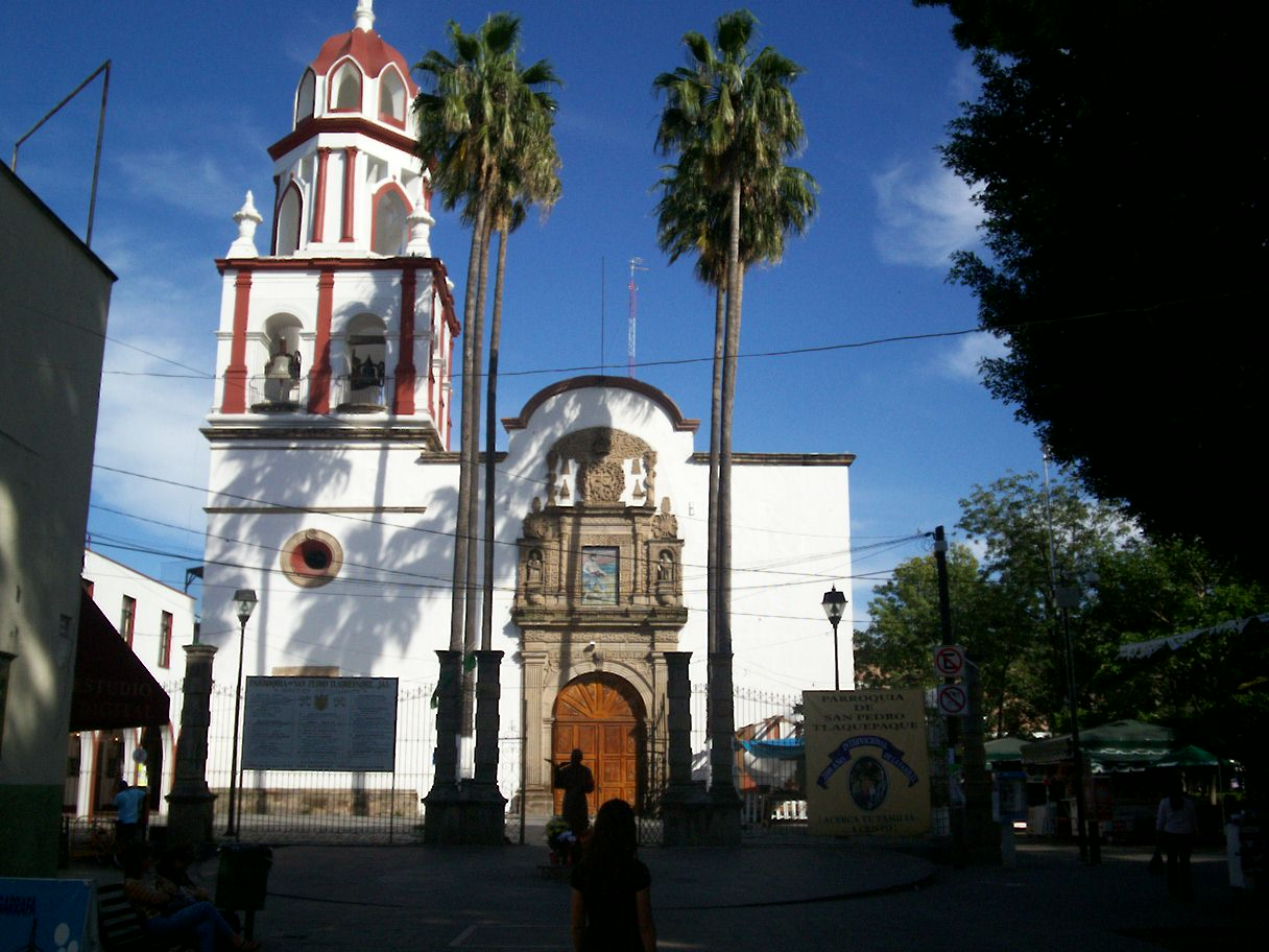 San Pedro Tlaquepaque Parish. Tlaquepaque, Jalisco, México.